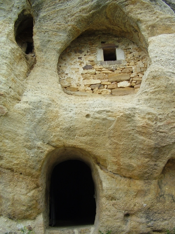 Ermita Rupestre de Arroyuelos, Valderredible, Cantabria